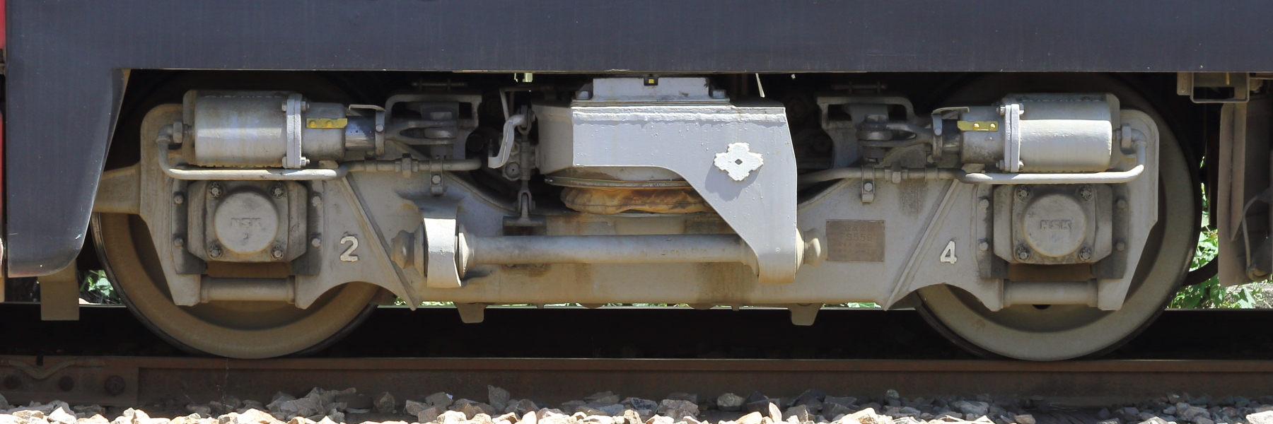 豊橋鉄道モ780形783の台車（住友FS-559）